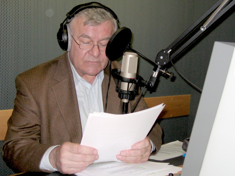 Joachim Kerzel bei der Vertonung der N24 Reportage "Rogue Waves" in einem ProSiebenSat.1 Produktion Berlin Schnittraum.